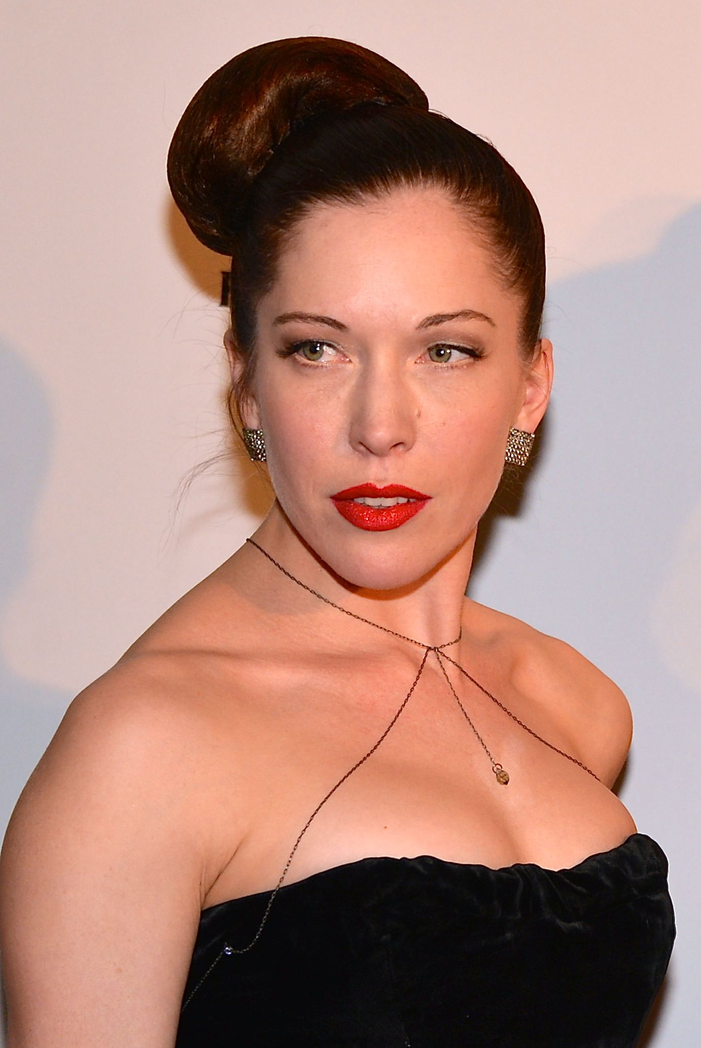 Yohanna Idha på Guldbaggegalan 21 januari 2013.